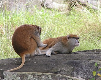 patas-aap eigen foto